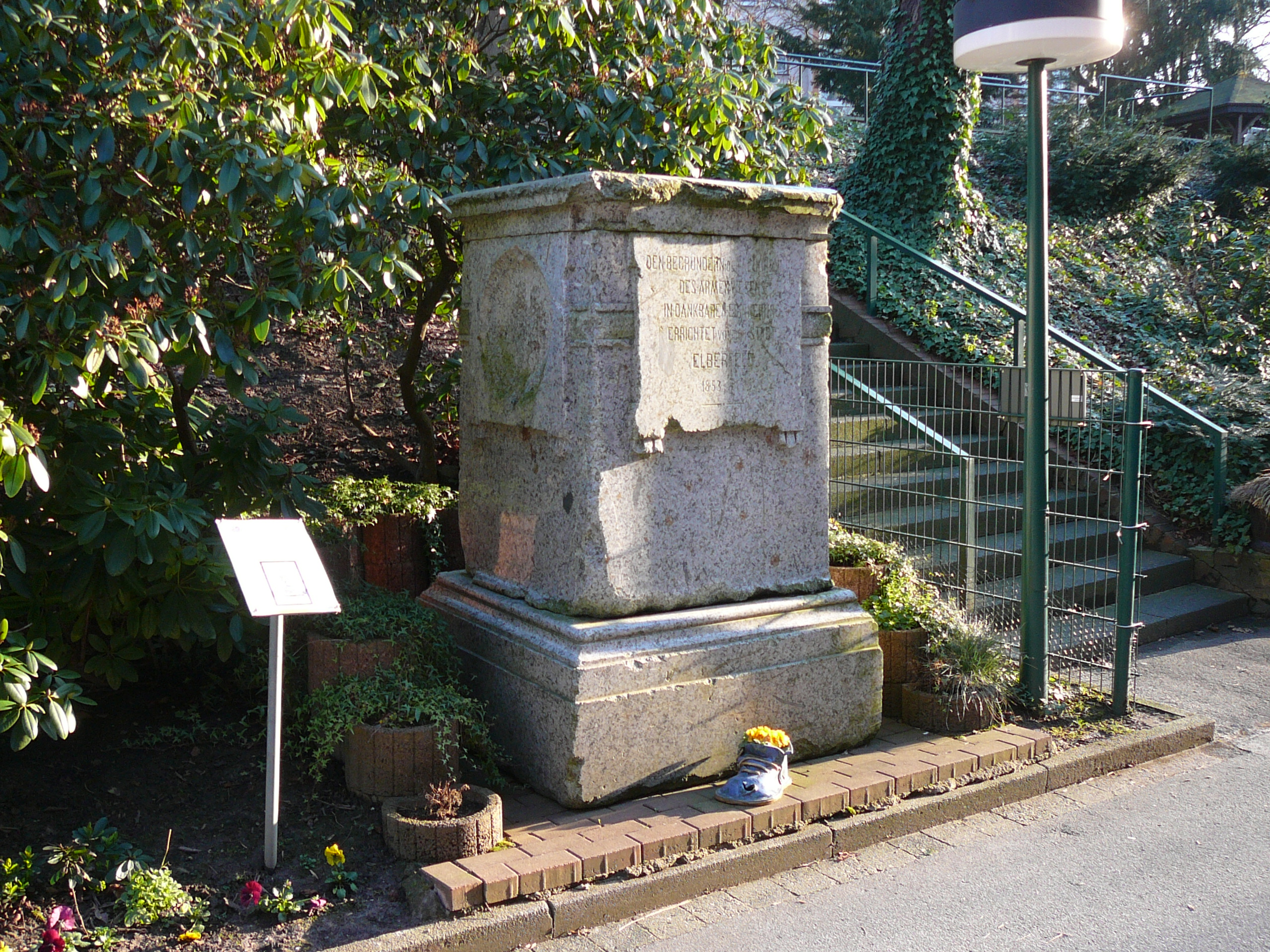 Reste des Elberfelder Armenpflegedenkmal, Reformiertes Gemeindestift Elberfeld, Blankstraße, Wuppertal